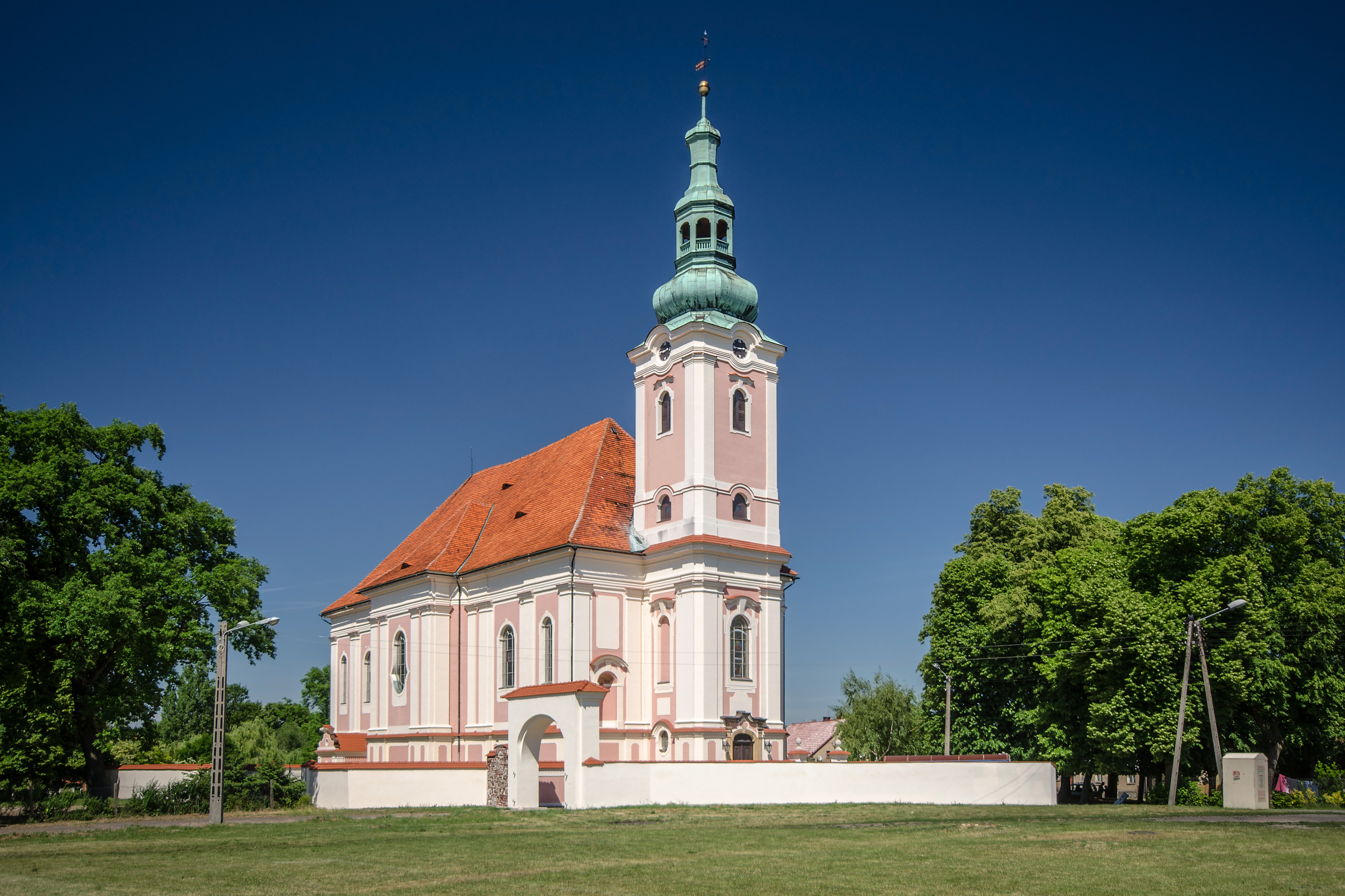 Siciny, kościół par. p.w. św. Marcina Biskupa, 1736-1742, XIX